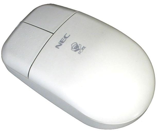 NECホームエレクトロニクス、PC-FX Mouse